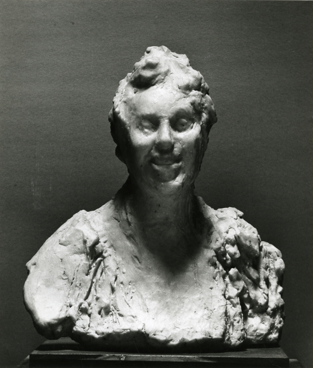 Servizio fotografico : Torino, 1978 / Paolo Monti. - Stampe: 3 : Positivo b/n, gelatina bromuro d'argento/ carta, 24x24. - ((Al verso delle stampe manoscritto numero di negativo corrispondente: 3134/29, 3170/12, 3179/29. Sul coperchio della scatola manoscritto a pennarello nero: "Medardo Rosso". - Occasione: Documentazione per la pubblicazione del catalogo: "Medardo Rosso, 1858-19" , Ed. Der Kunstverein, 1984. - Fonte: Agenda di Paolo Monti: Nikon Leika 3001-/ Monti 1978 (1978-1982), presso Archivio Paolo Monti